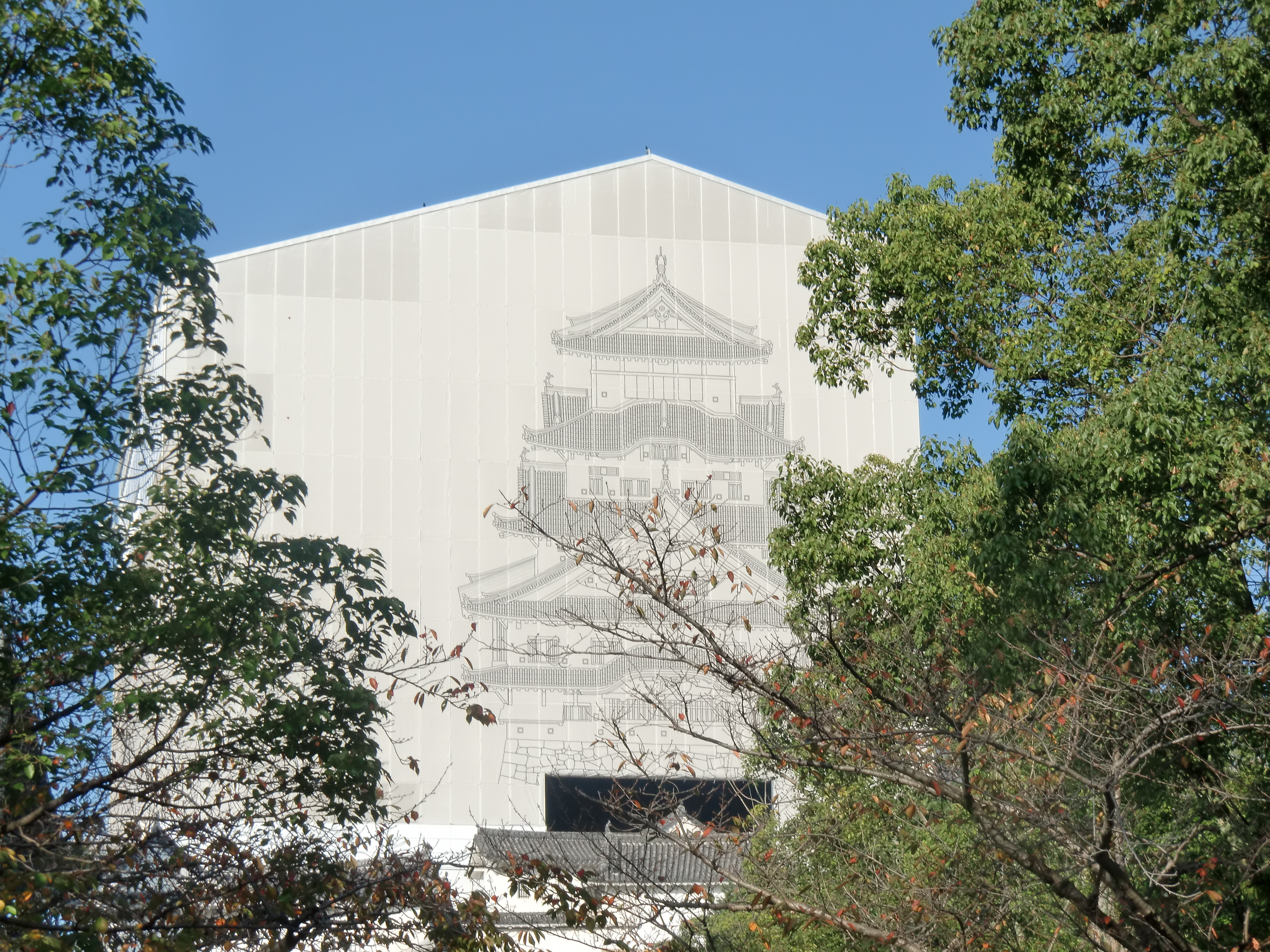 平成の大修理中の姫路城天守閣